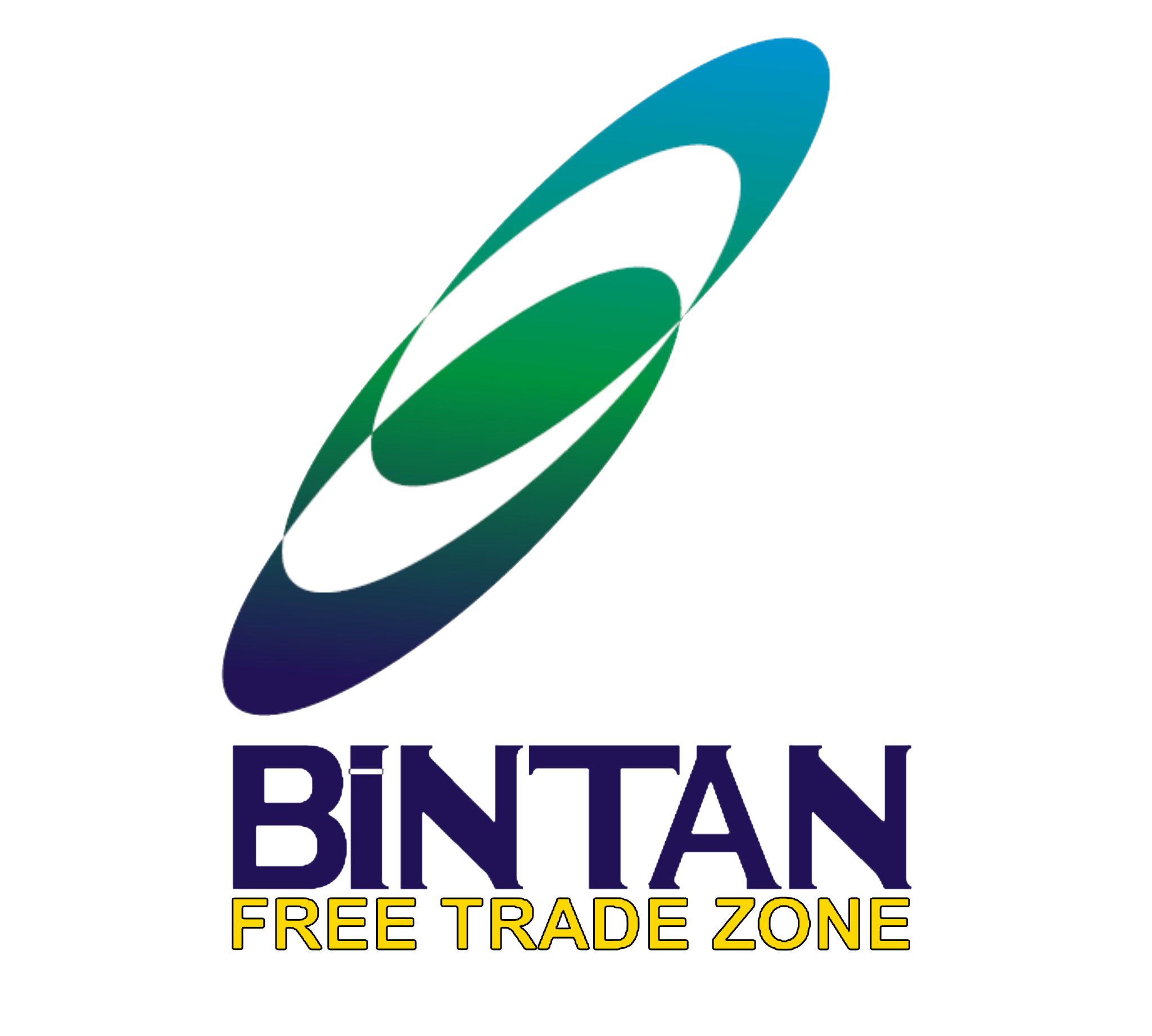 Logo Resmi Badan Pengusahaan Kawasan Perdagangan Bebas dan Pelabuhan Bebas Bintan